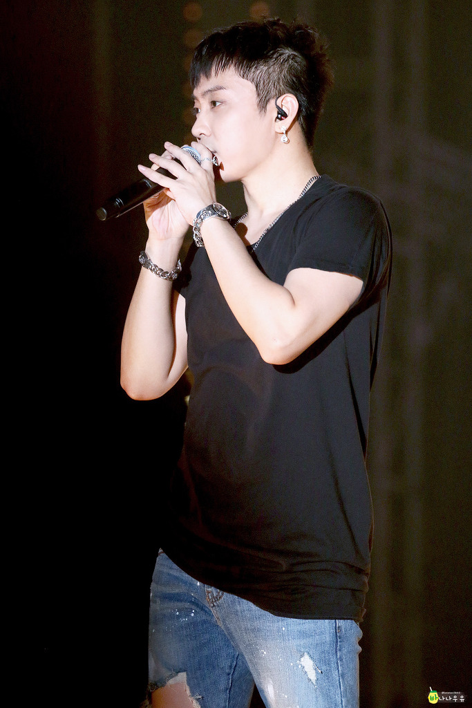 20180106 젝스키스 20주년콘서트 @대구